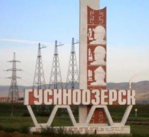 фото с дороги